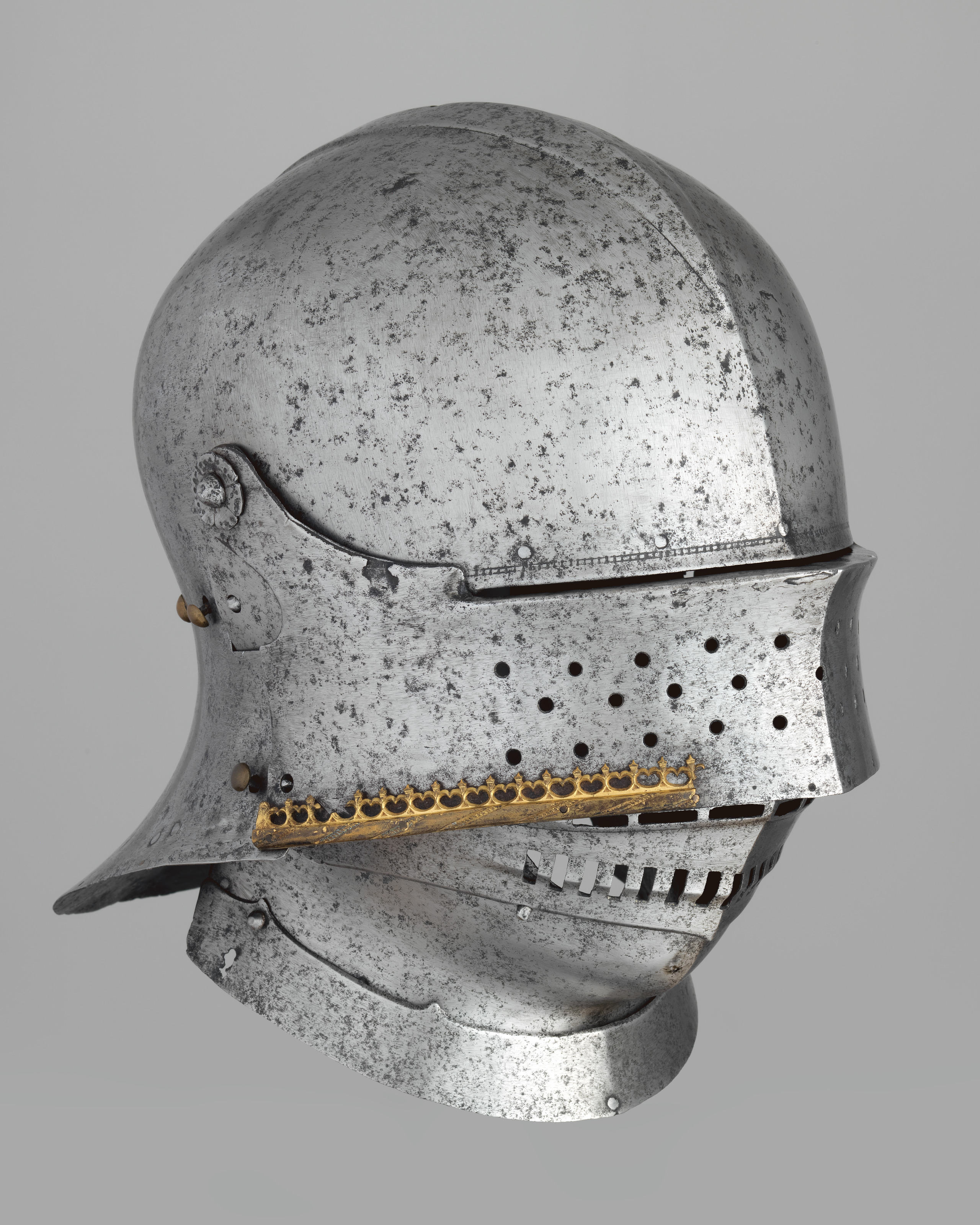 German, Augsburg; Sallet; Helmets